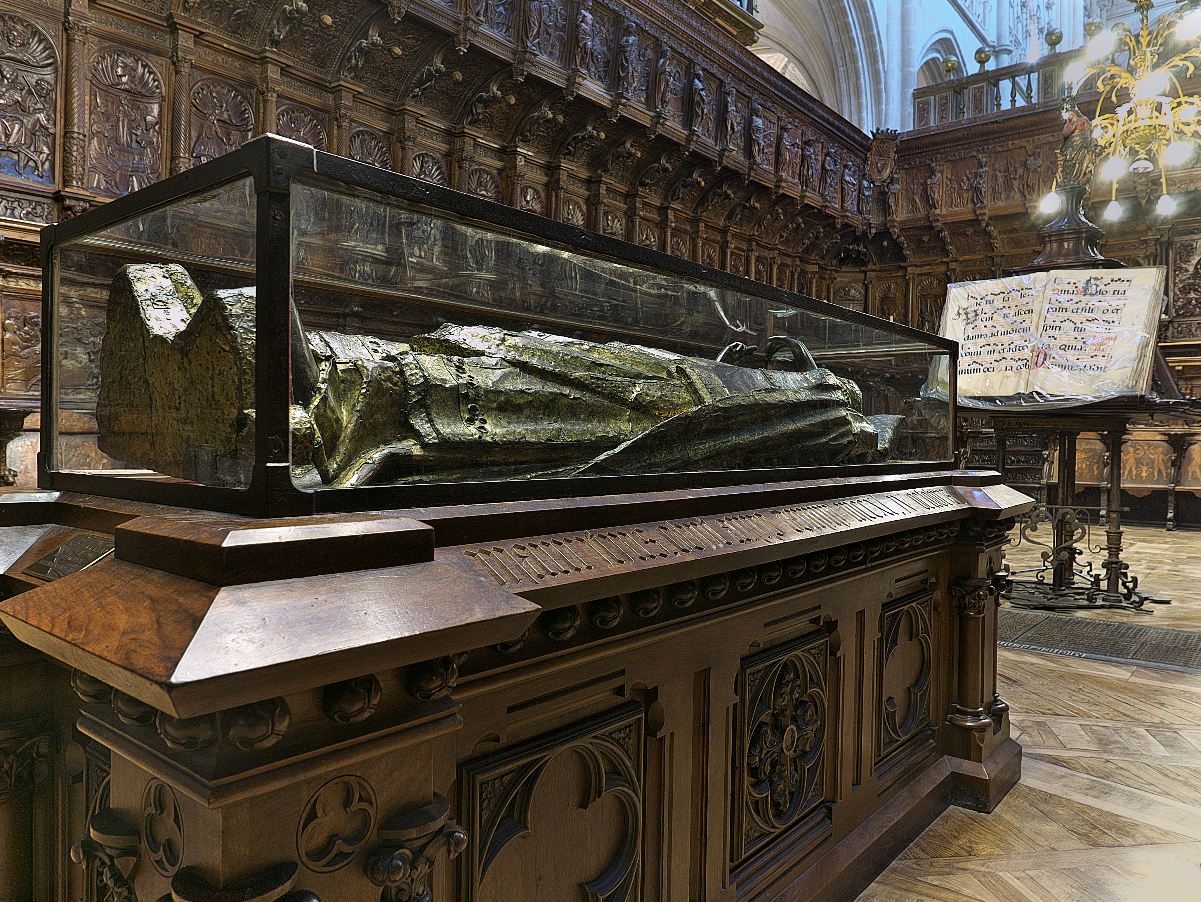 Coro de la Catedral de Burgos. Sepulcro del obispo de don Mauricio (†1238), artífice de la Catedral de Burgos con Fernando III el Santo.